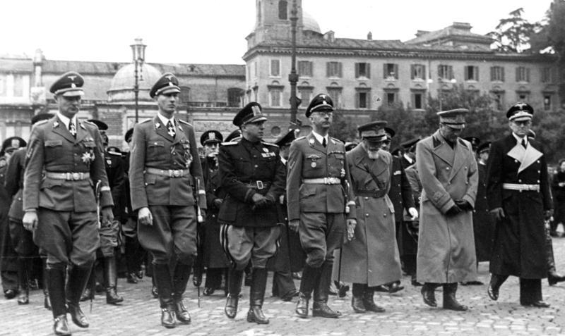 Rom Vertreter der Ordn. Pol. Gen. v. Bomhard [nicht auf Foto] ging neben Gf. Wolff, Obgrf. Heydrich Vertreter der SichPol., ?, Himmler RFSS, de Bono, Graziani, Deutscher Botschafter v. Mackensen ? Information added by Wikimedia users.*